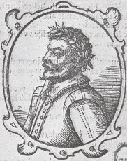 Matthijs de Castelein op de titelpagina van de Rotterdamse druk van Pyramus en Thisbe, uit 1612